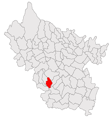 Categorie:Hărţi ale judeţului Buzău